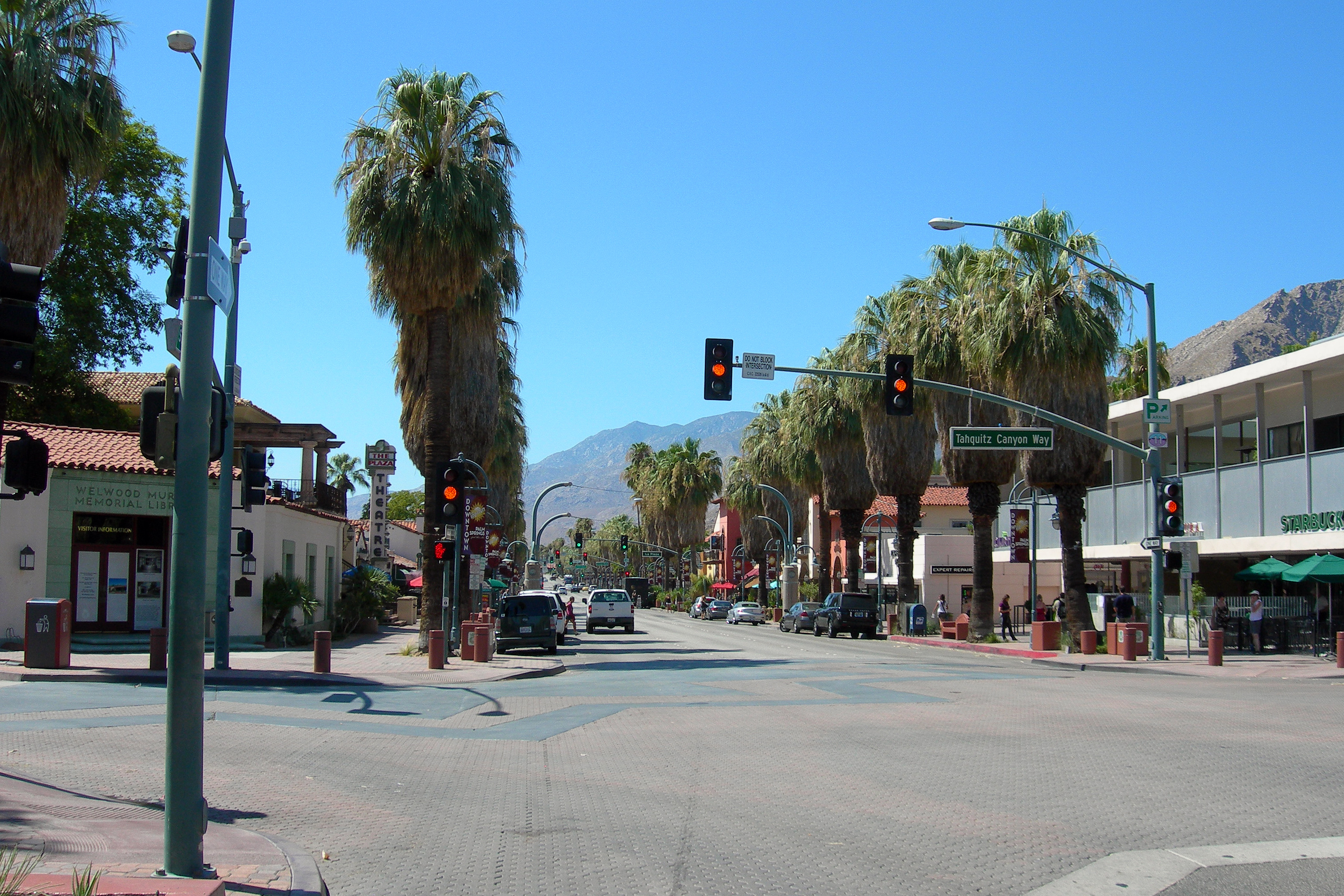 Palm Springs - Tahquitz Canyon Way - Agosto 2011